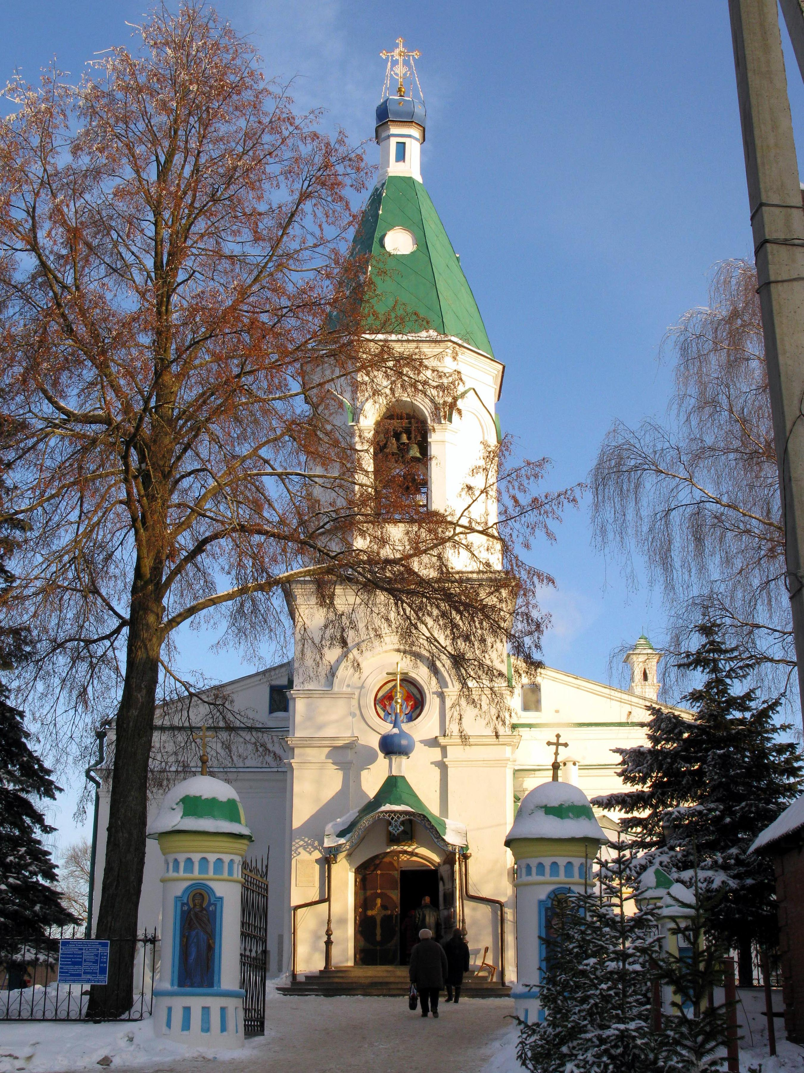 Храм Рождества Пресвятой Богородицы (Волоколамск)